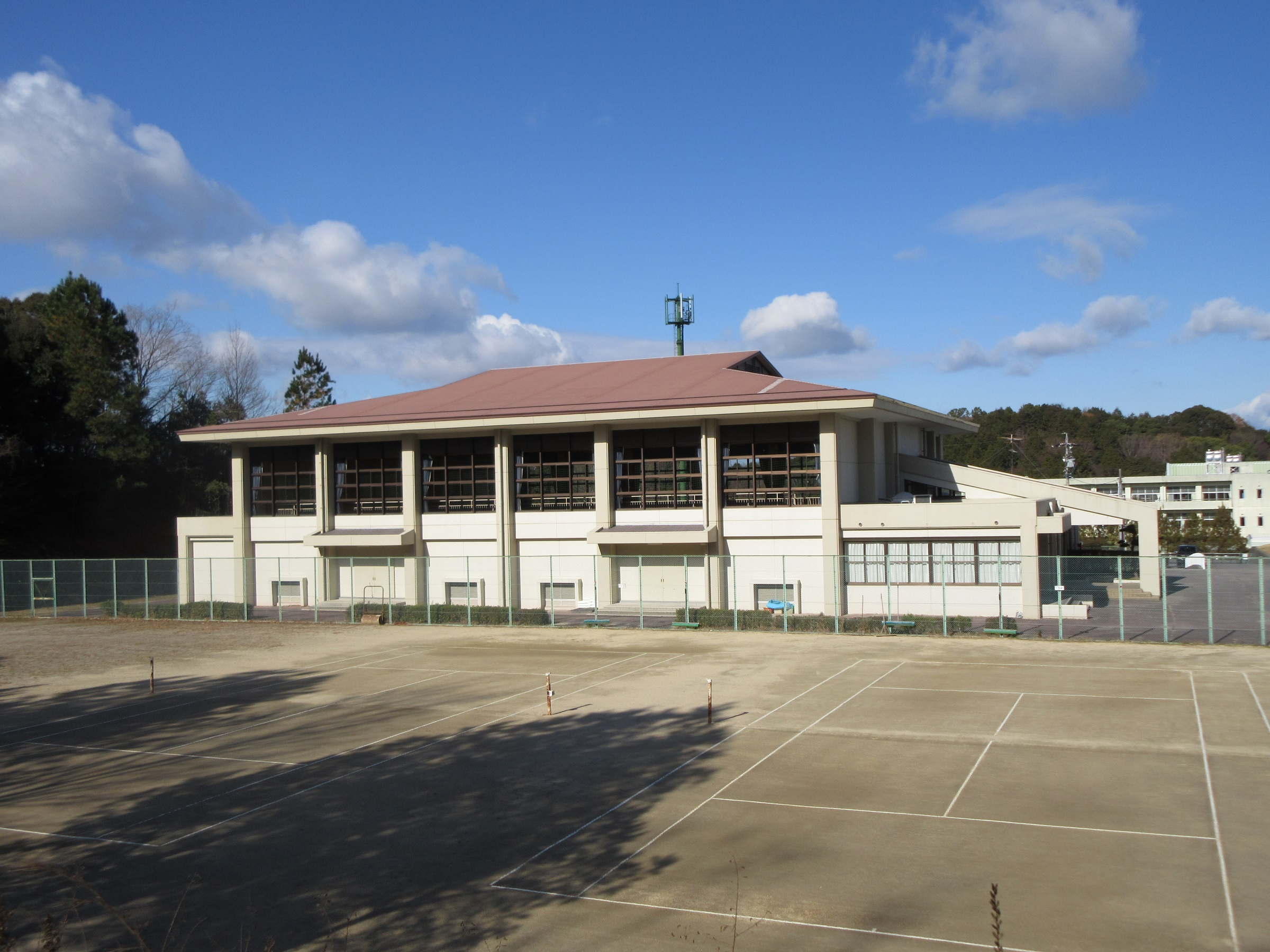 岡崎市花園体育センター（岡崎市桑原町）